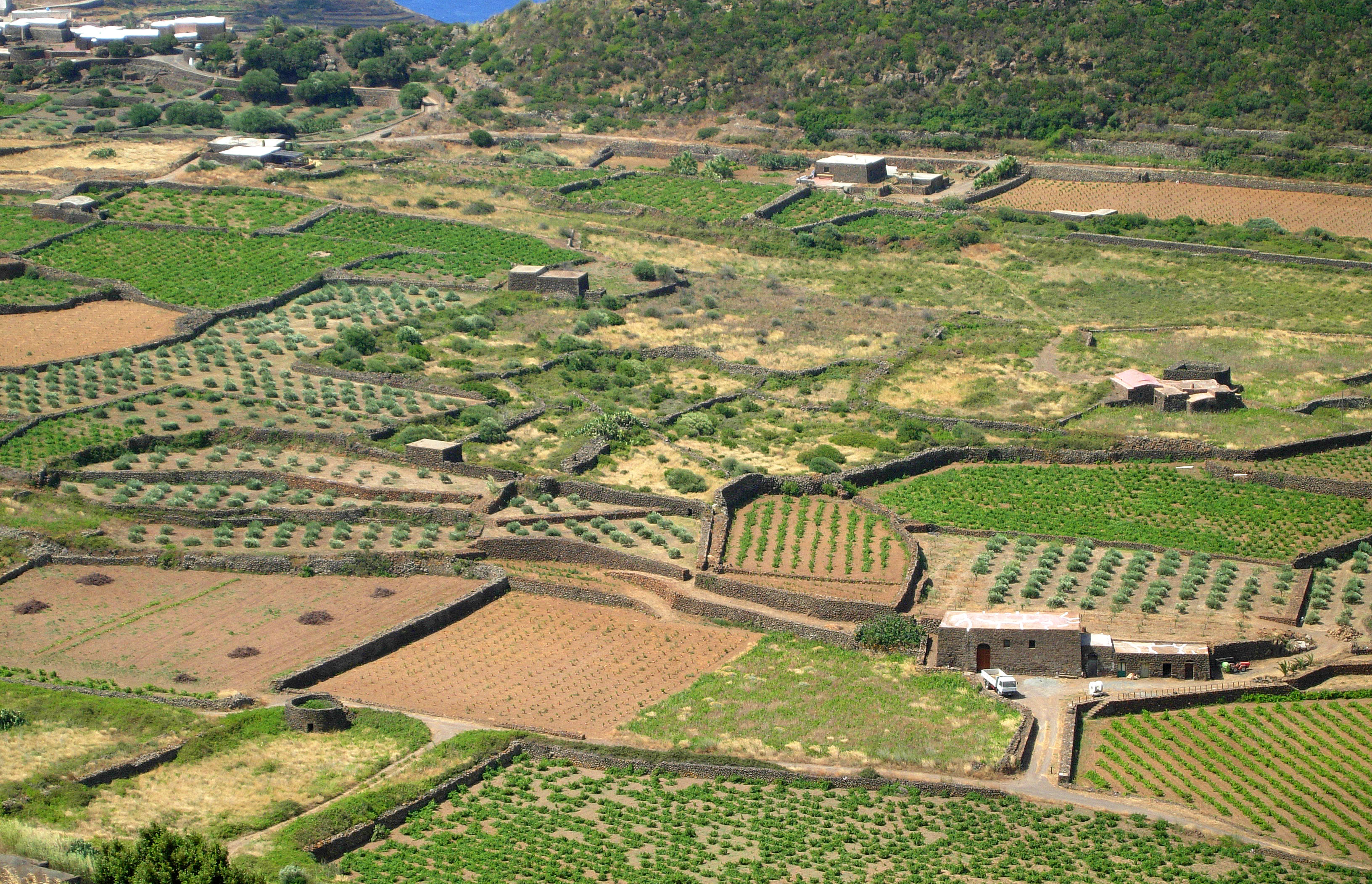 Campi a Pantelleria